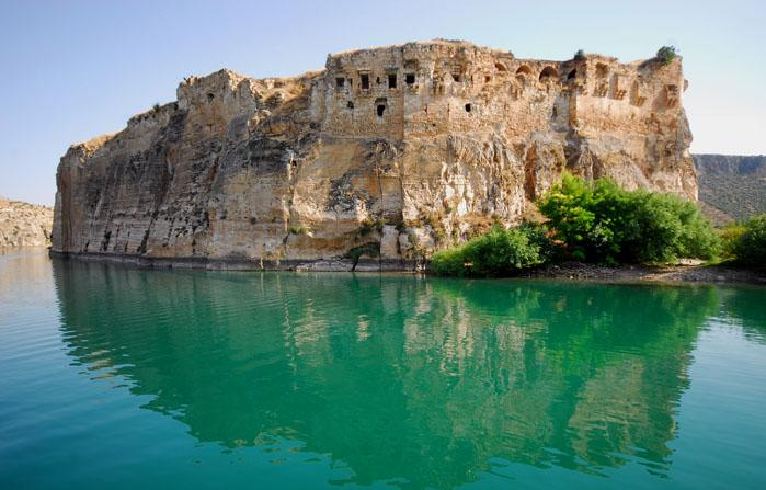 Halfeti - Rumkale